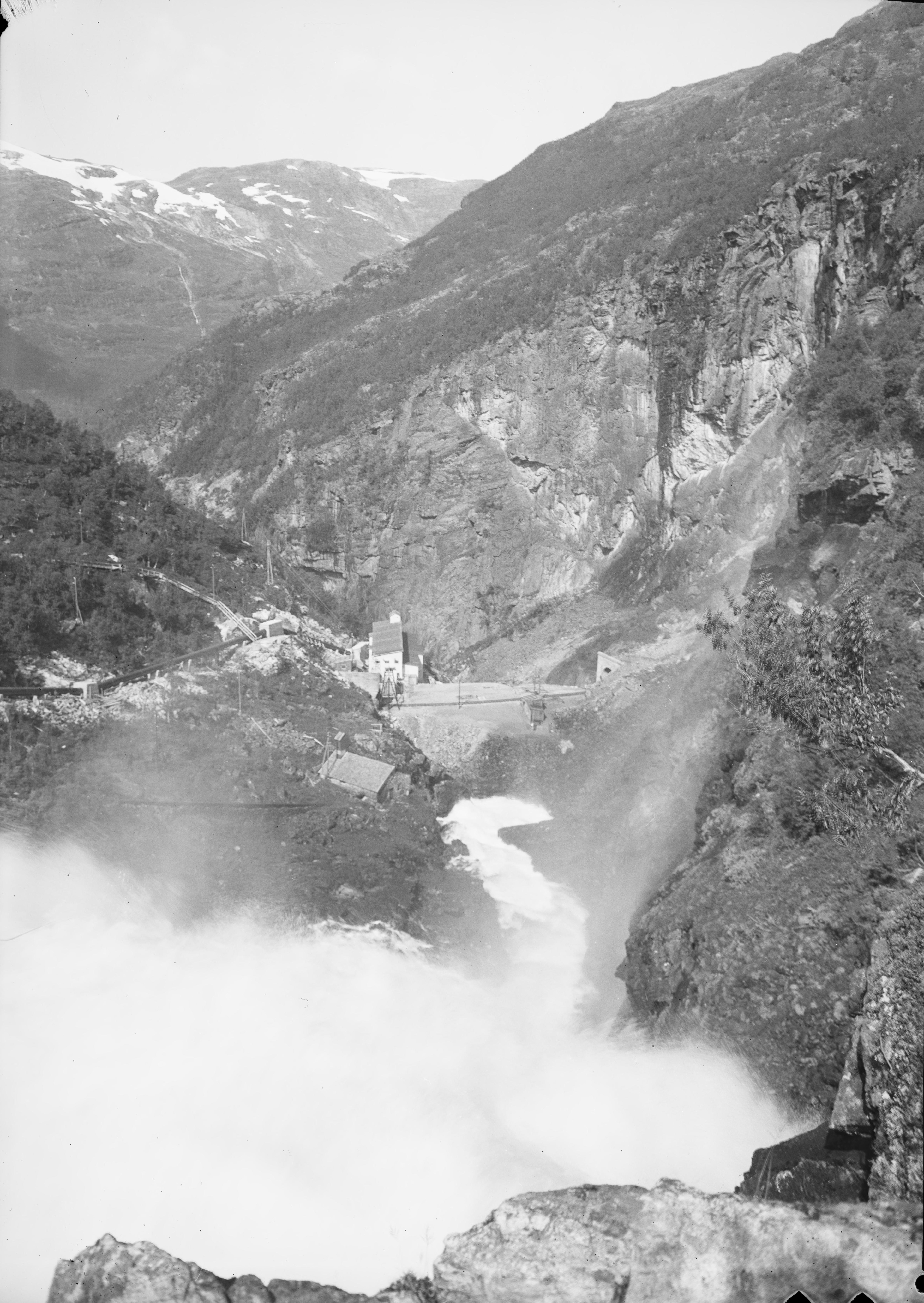 Bildet er hentet fra Nasjonalbibliotekets bildesamling. Anmerkninger til bildet var: Fotograf ukjent. Flåmsdalen,Kjosfoss, Aurland, Sogn og Fjordane